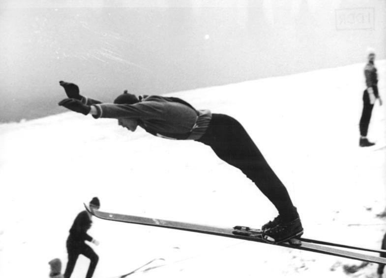 Zentralbild Gahlbeck 12.1.1962 Erstes Ausscheidungsspringen für Weltmeisterschaft Olympiasieger Helmut Recknagel (SC-Motor Zella-Mehlis) gewann am 12.1.1962 auf der großen Fichtelberg-Schanze in Oberwiesenthal überlegen das erste Ausscheidungsspringen der DDR-Elite für die Weltmeisterschaften in Zakapone. Mit Note 235,7 verwies er Willy Wirth (ASK Vorwärts Brotterode) und seinen Klubkameraden Veit Kührt sicher auf die Plätze. UBz: Der Zweite des Ausscheids, Willy Wirth, beim Sprung.